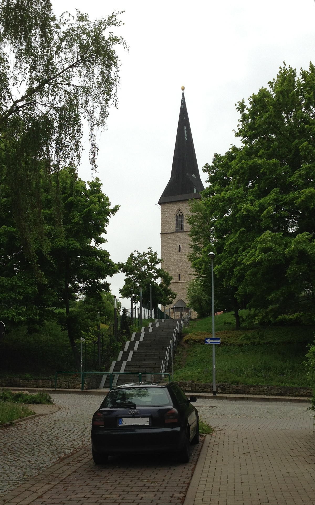 Der Turm der Petrikirche von "Am Petersberg"